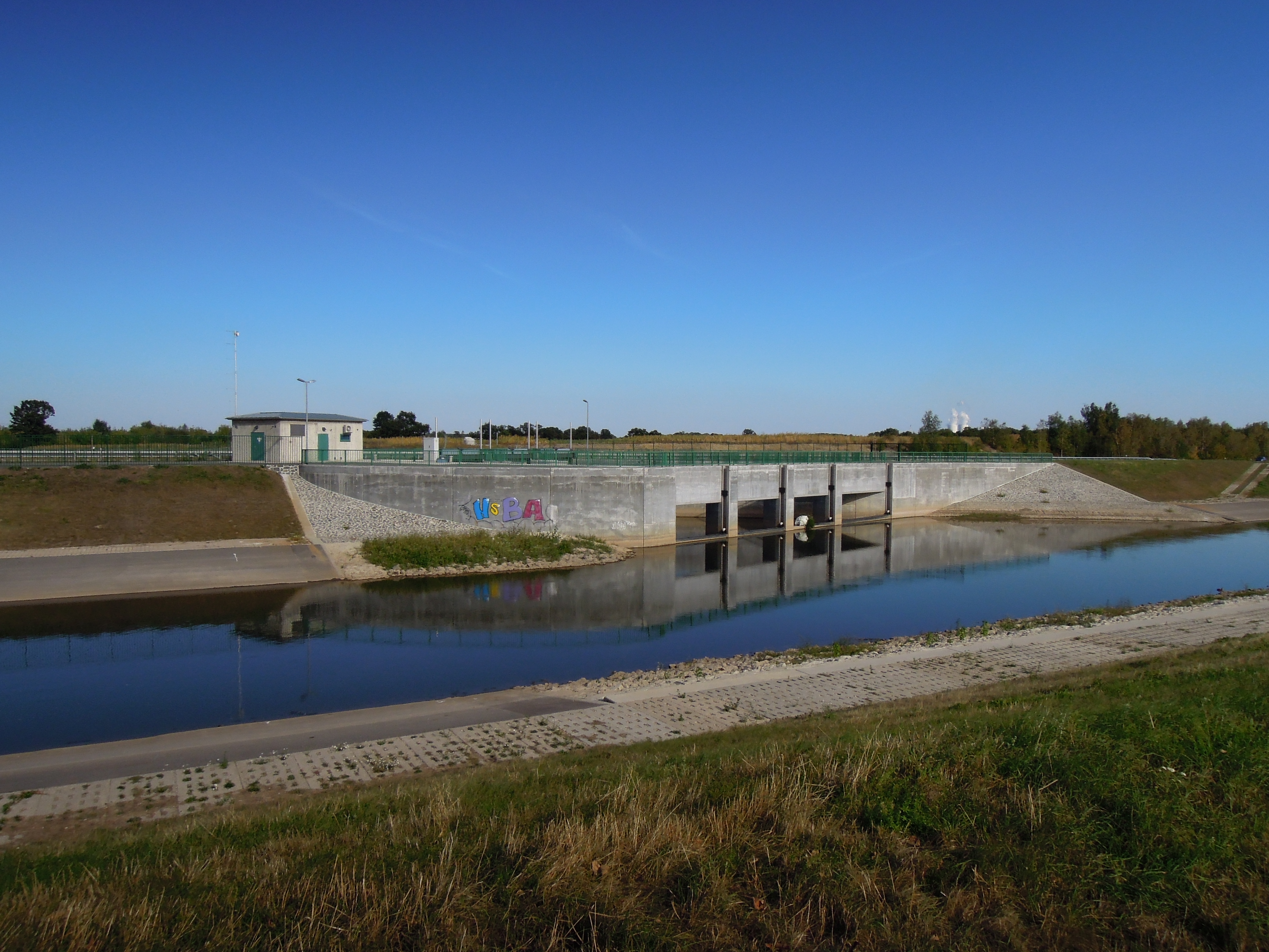 Der Hochwasserzulauf der Weißen Elster (Betonelster) in den Zwenkauer See (Tagebausee).